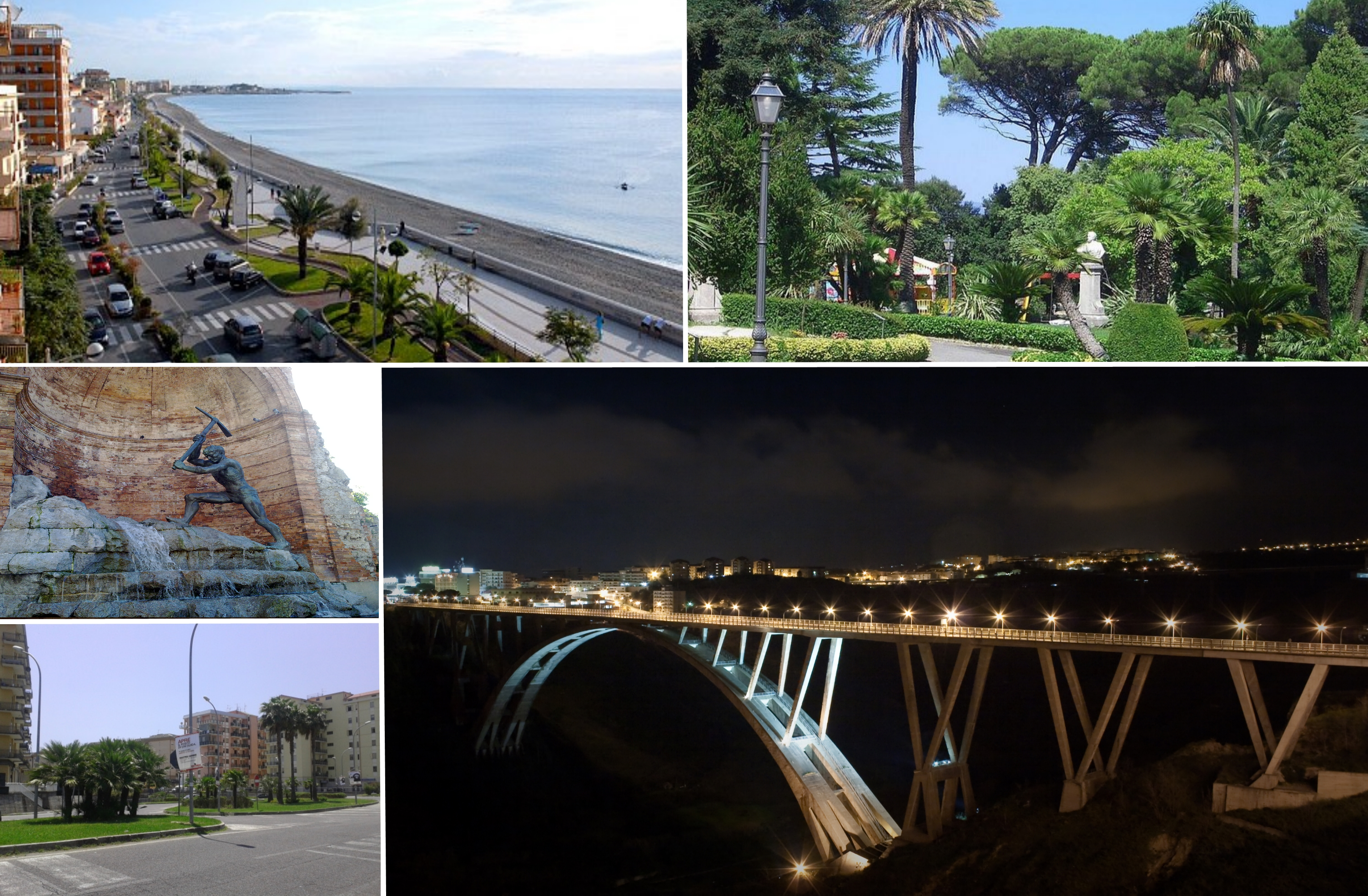 collage delle foto